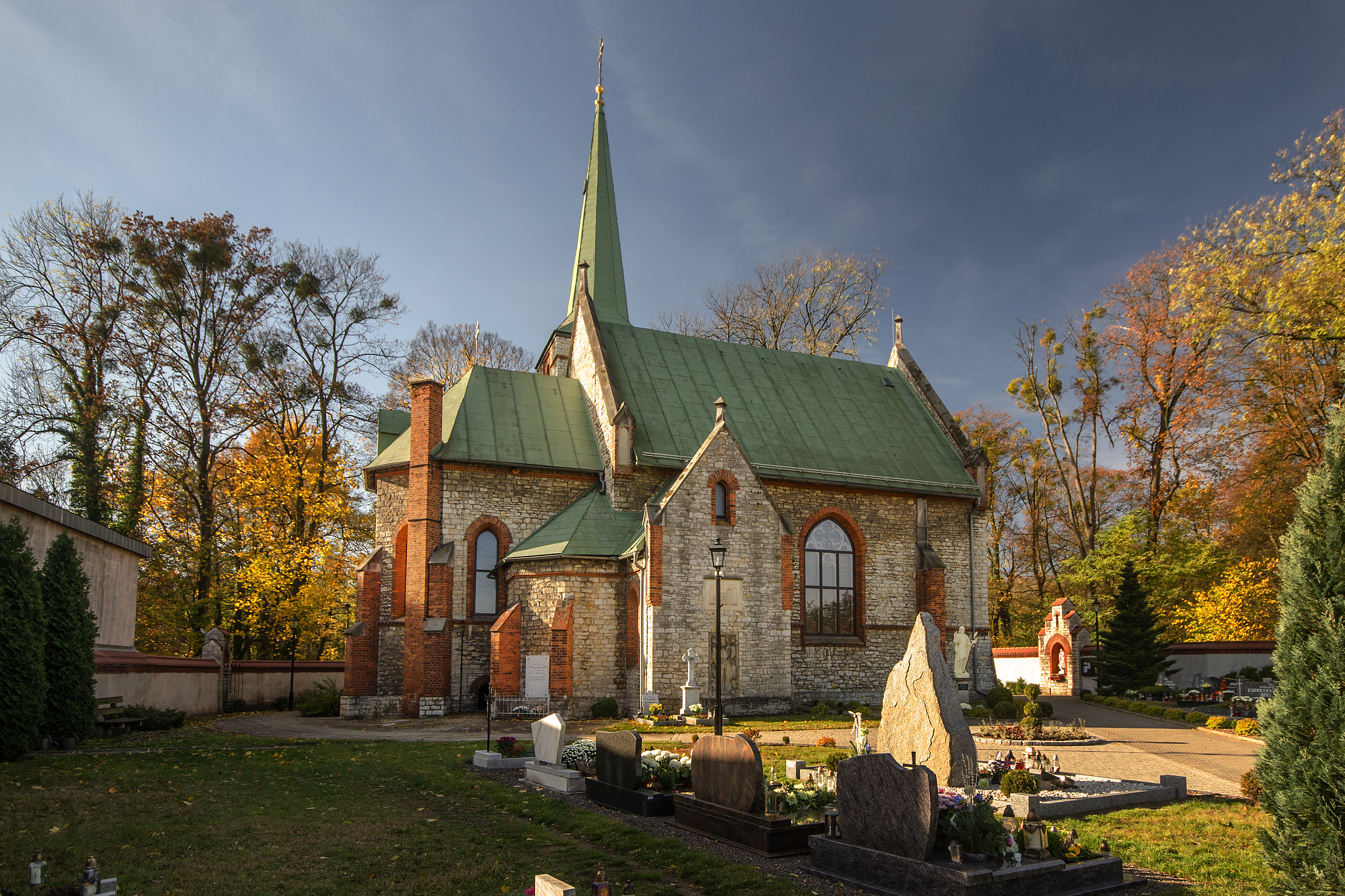 Dobra, ul. Szkolna 7 - rzymskokatolicki kościół parafialny pw. św. Jana Chrzciciela, 3 ćw. XIX